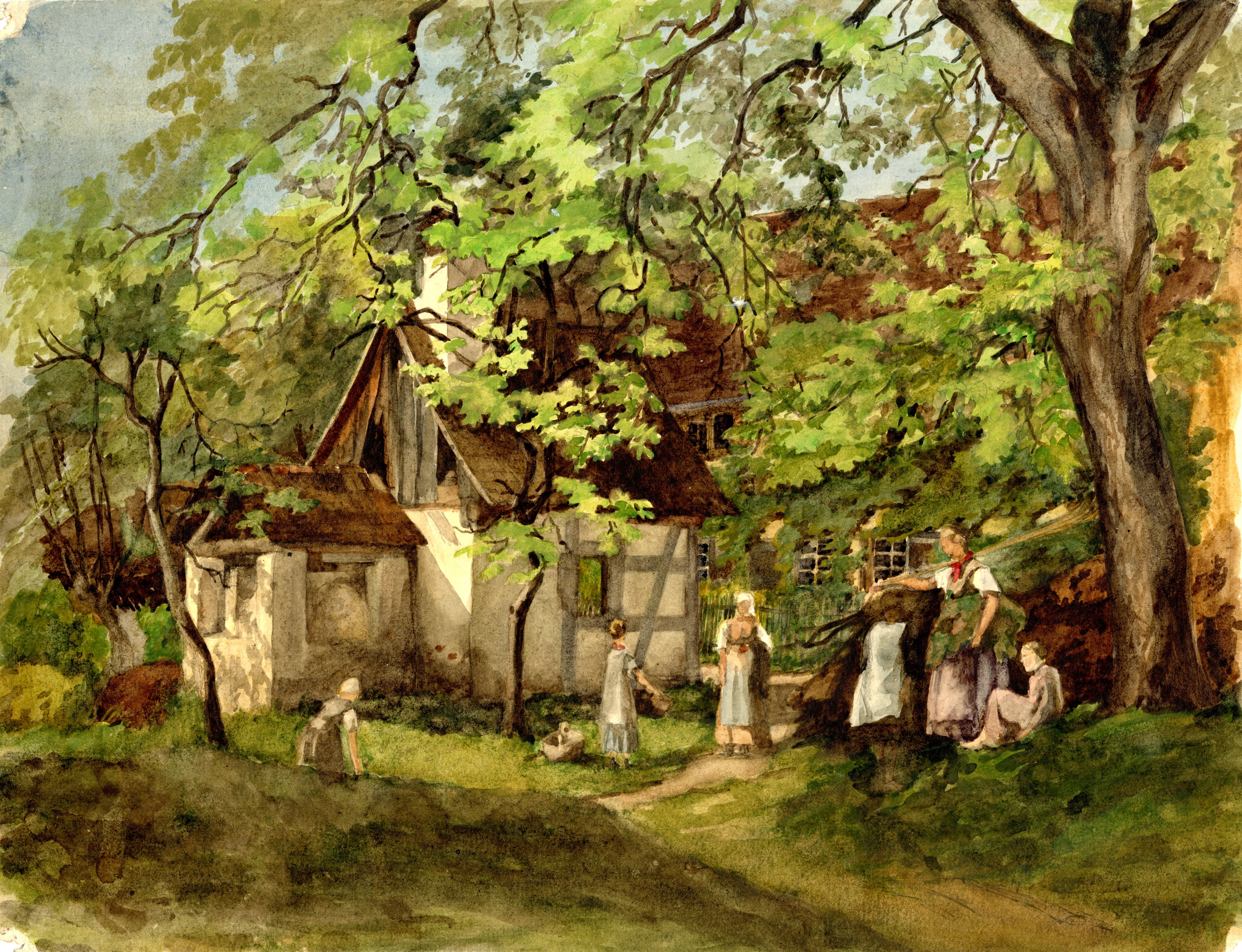 Amalie Vanotti: Bauernhof im Wald, o. J.; Gouache, 27,3 × 35,7 cm; Rosgartenmuseum Konstanz (auf Bild beschnitten)